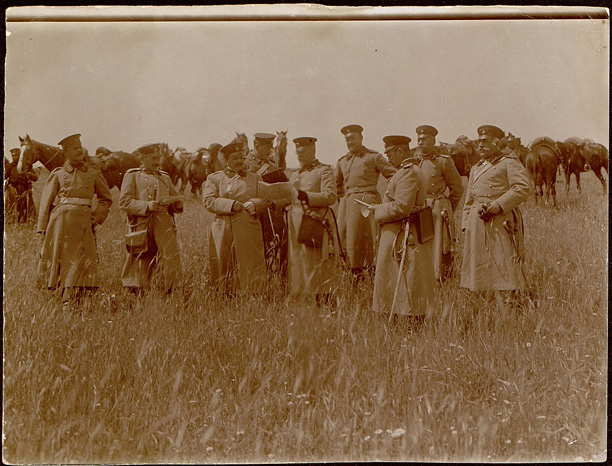 Щабът на ІІІ армия, начело с командира на армията генерал Радко Димитриев и началник щаба му генерал Константин Жостов, разглежда плана на оперативните действия, Чаталджа 1912 година